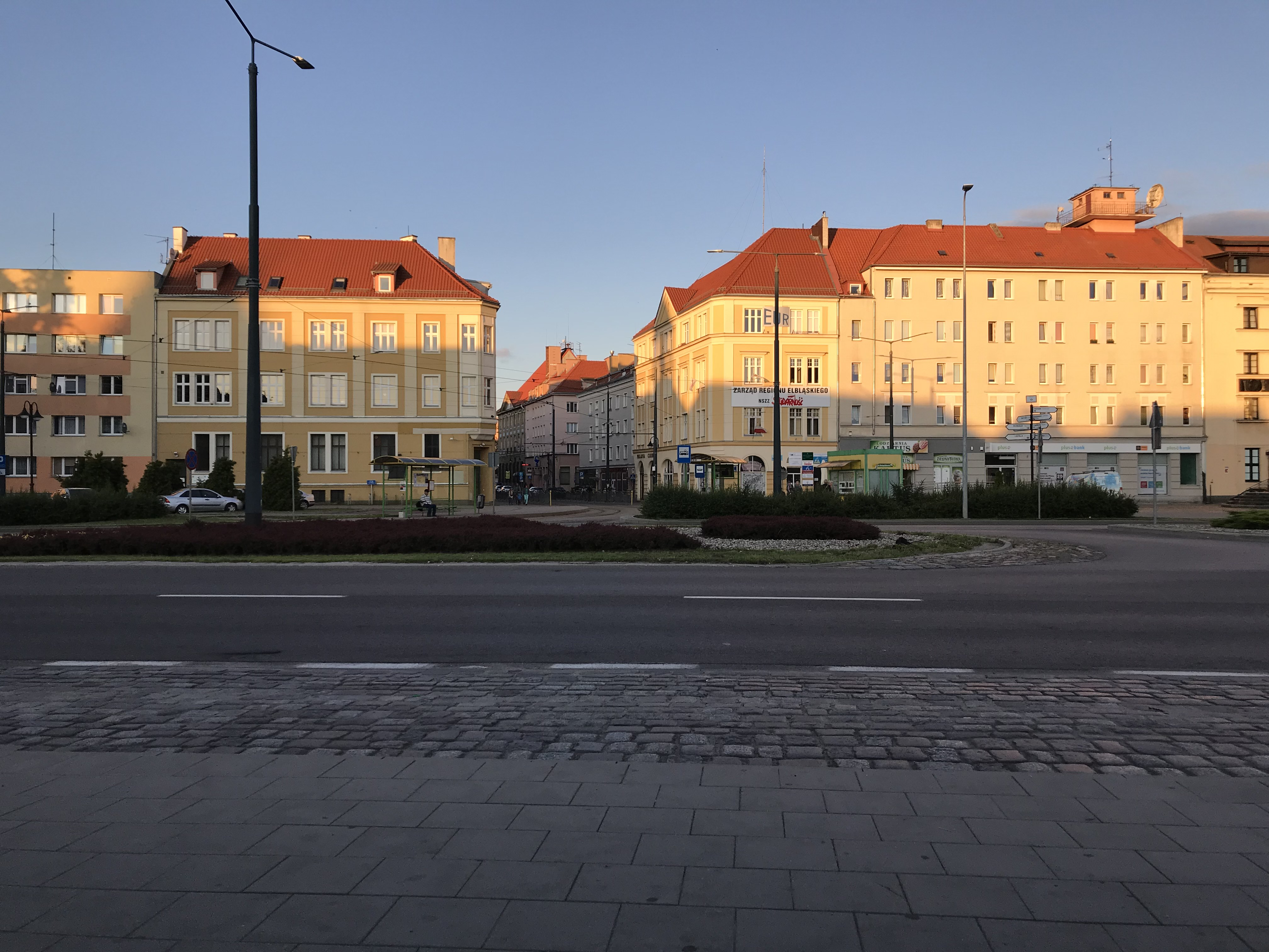 Plac Słowiański w Elblągu